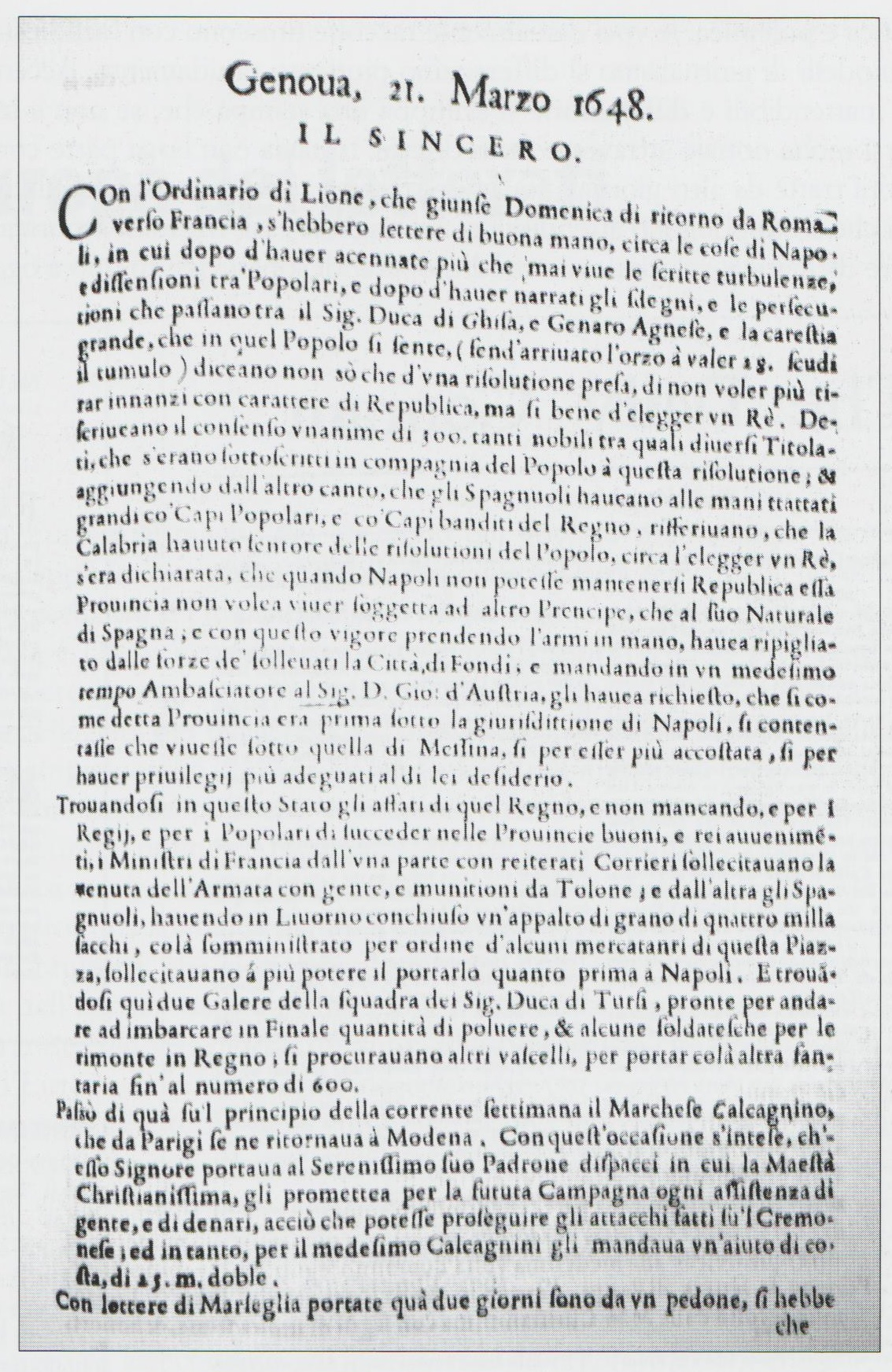 Testata della gazzetta «Il Sincero», pubblicata a Genova da Luca Assarino nel 1646.